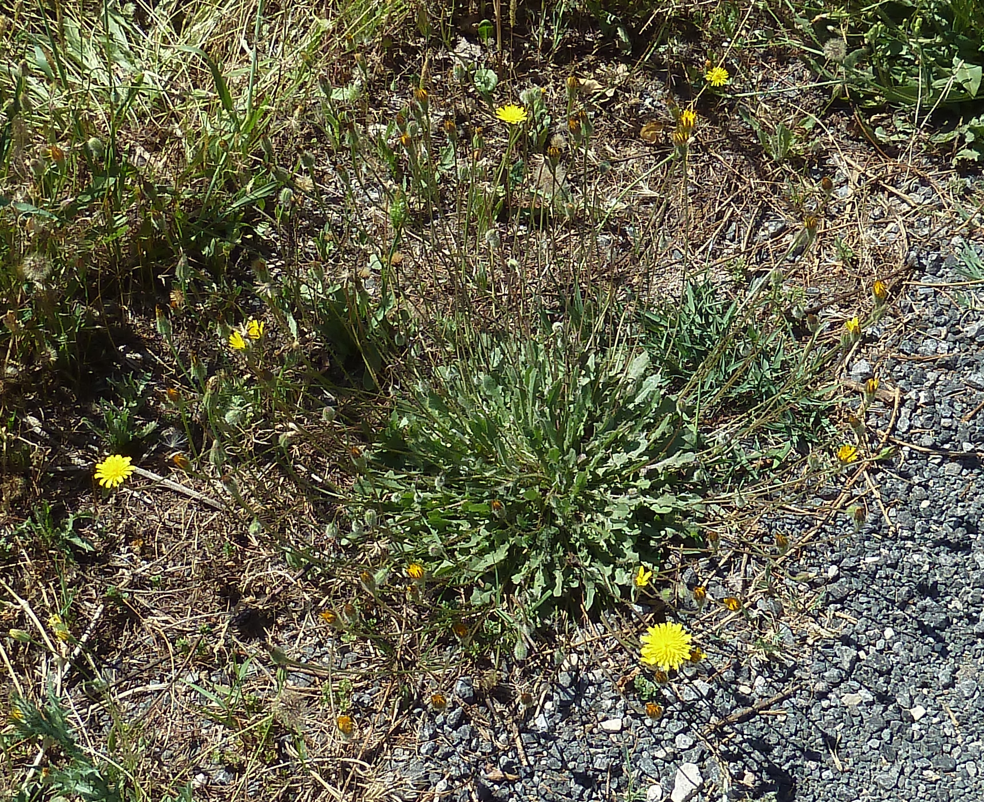 Leontodon longirostris (lechuguilla) - Vista general - Camino de la Azarbe de Patricio, Albatera, Provincia de Alicante (España).